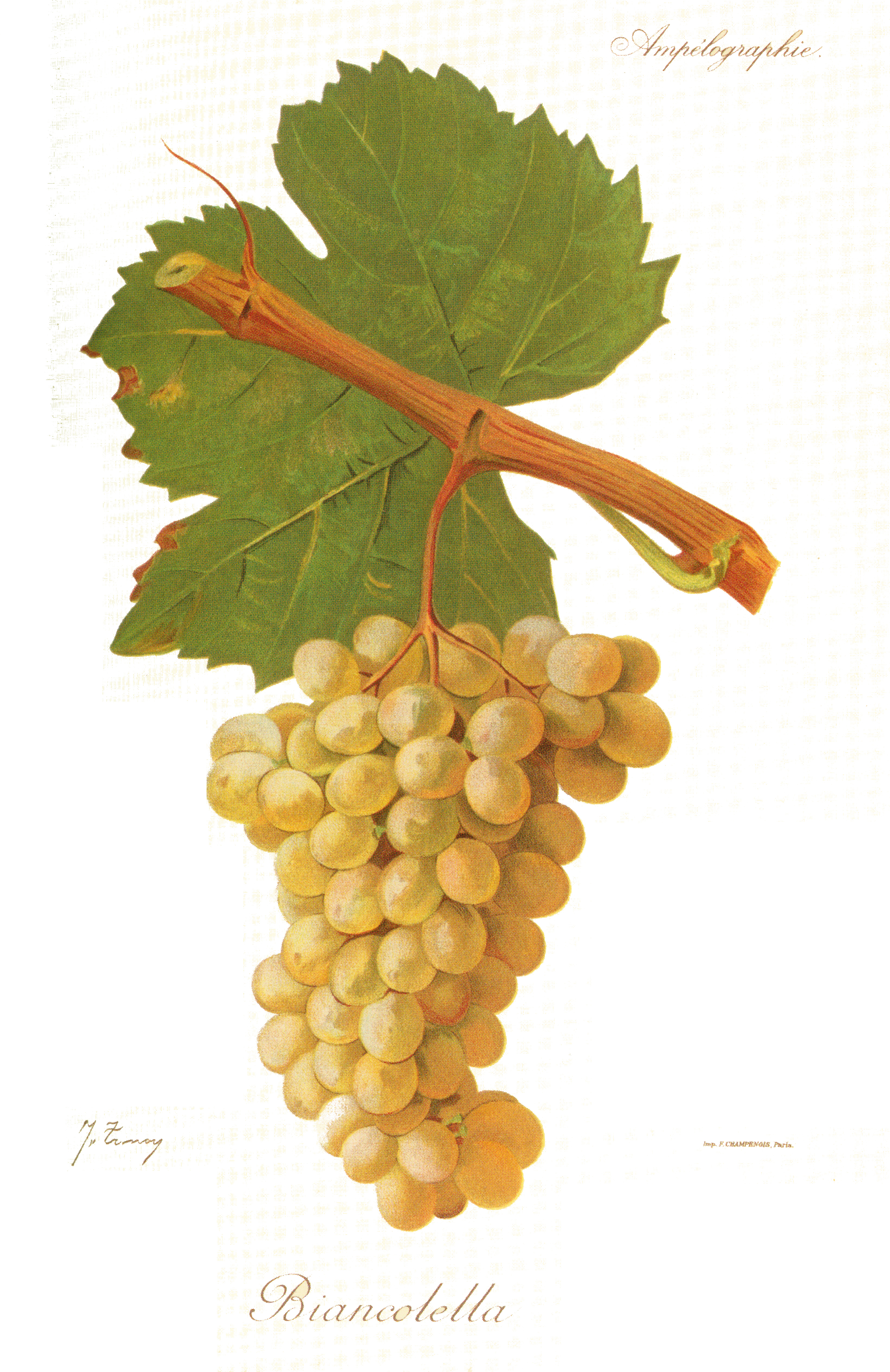 Biancolella w L'Ampélographie Viali i Vermorela (1901-1910)